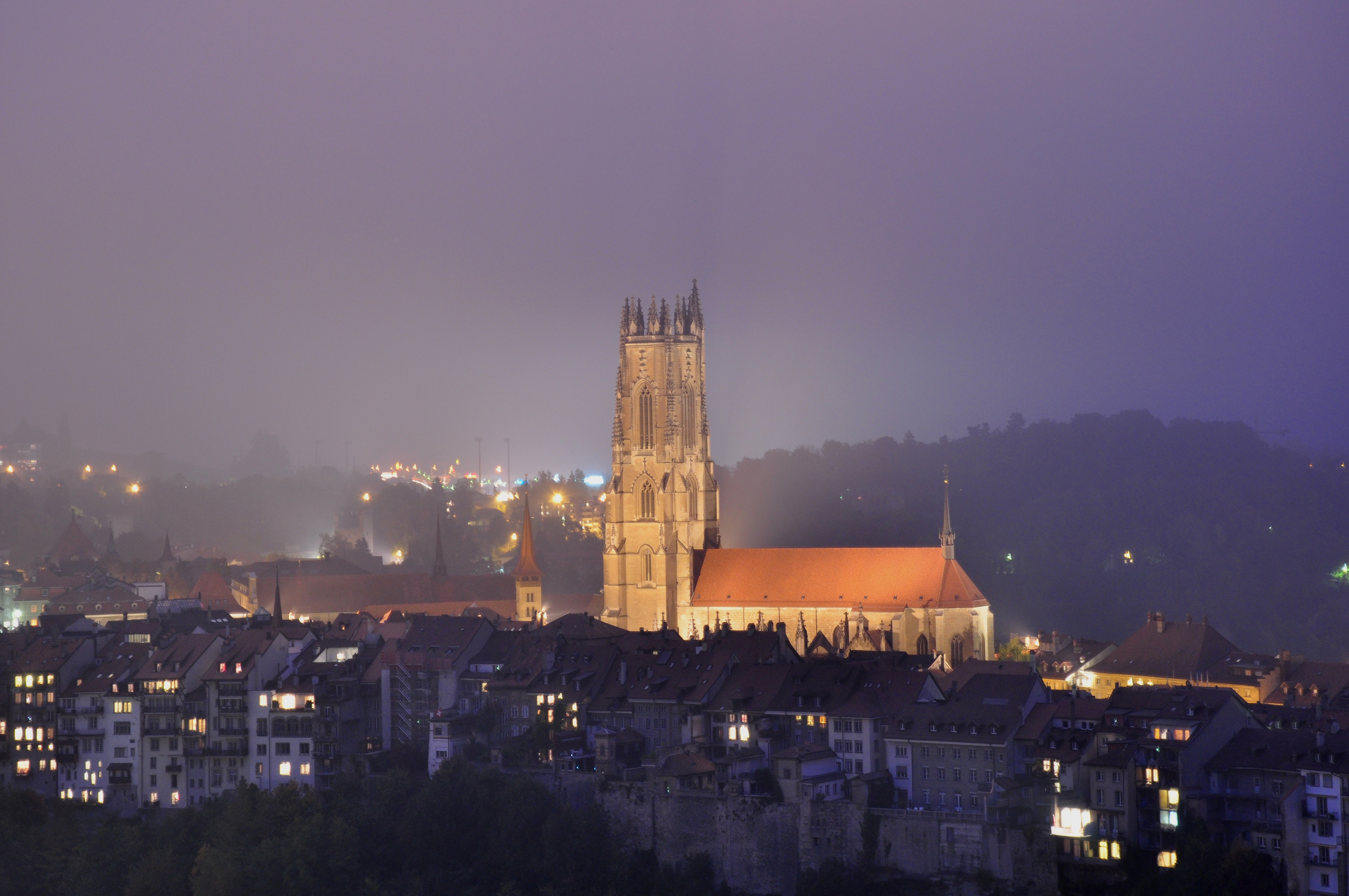 Cathédrale Saint-Nicolas de Fribourg, vue de nuit depuis la chapelle de Lorette.